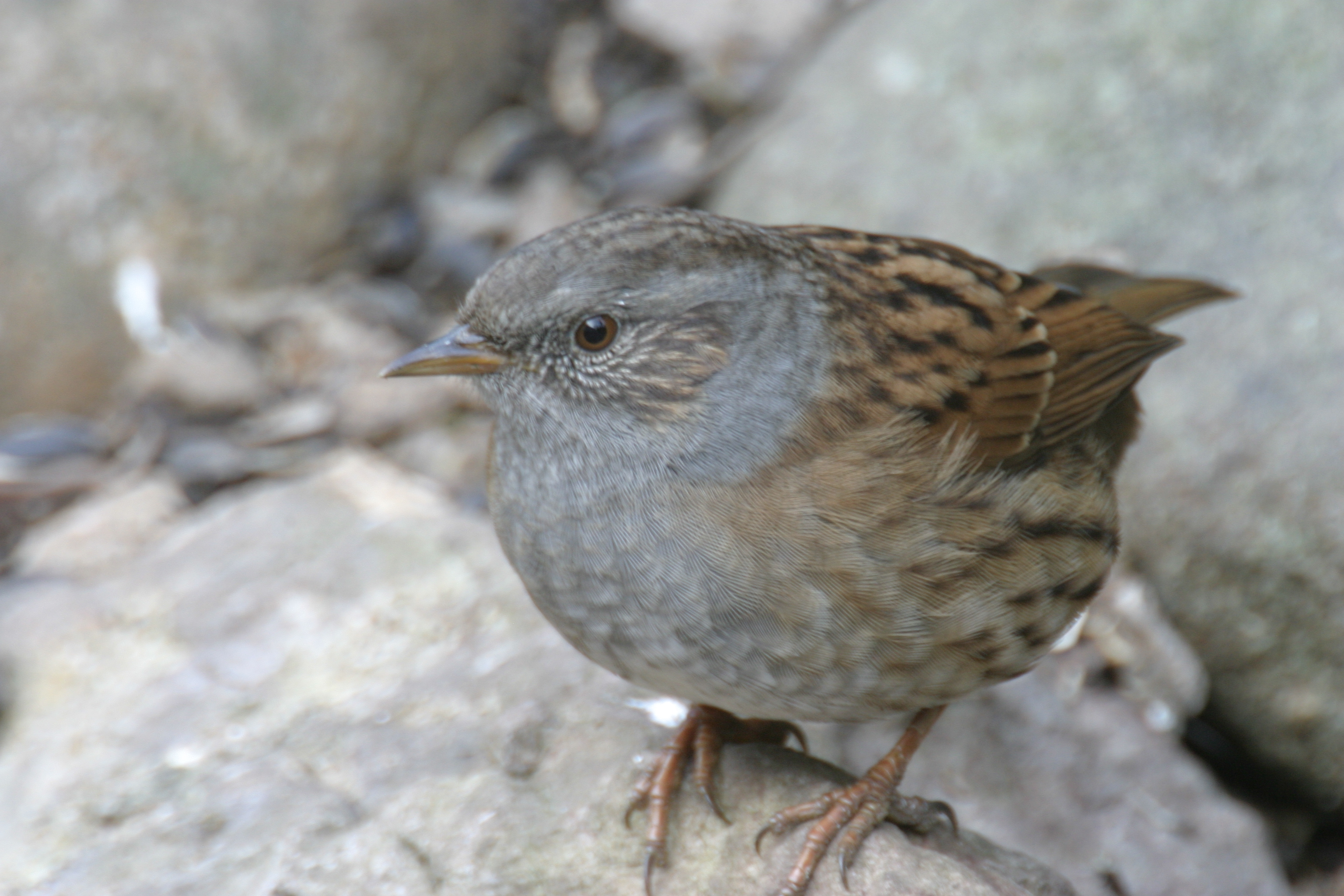 Dunnock, Prunella modularis